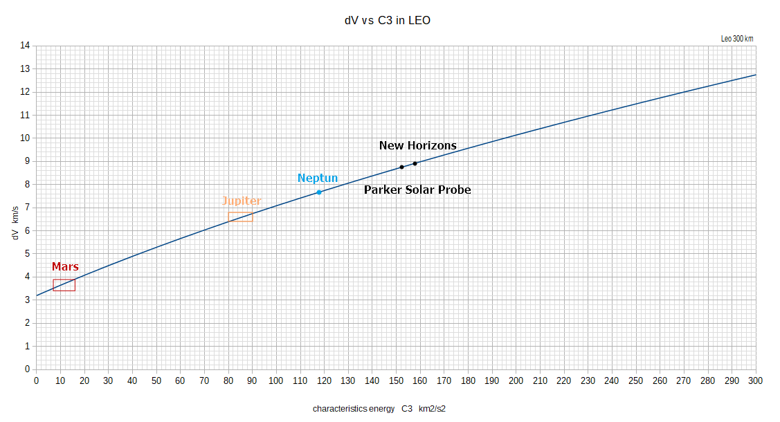 Characteristic energy C3 versus delta_V